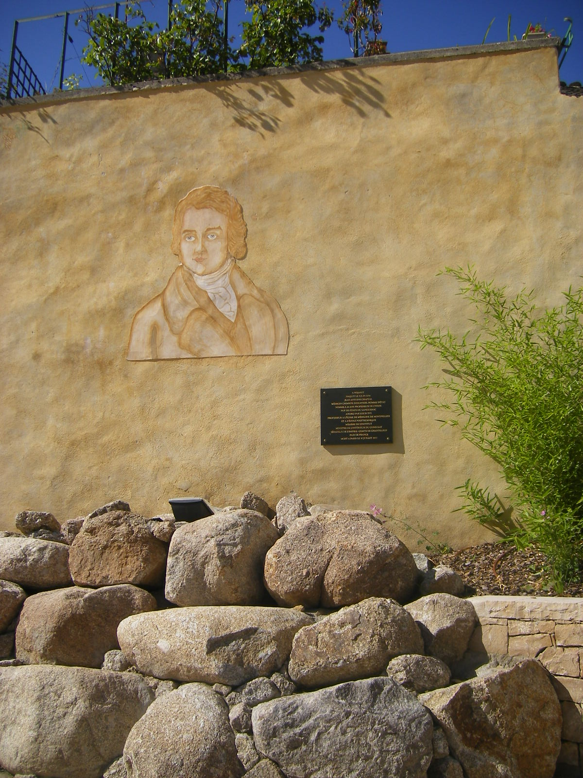 Badaroux - Jean-Antoine Chaptal